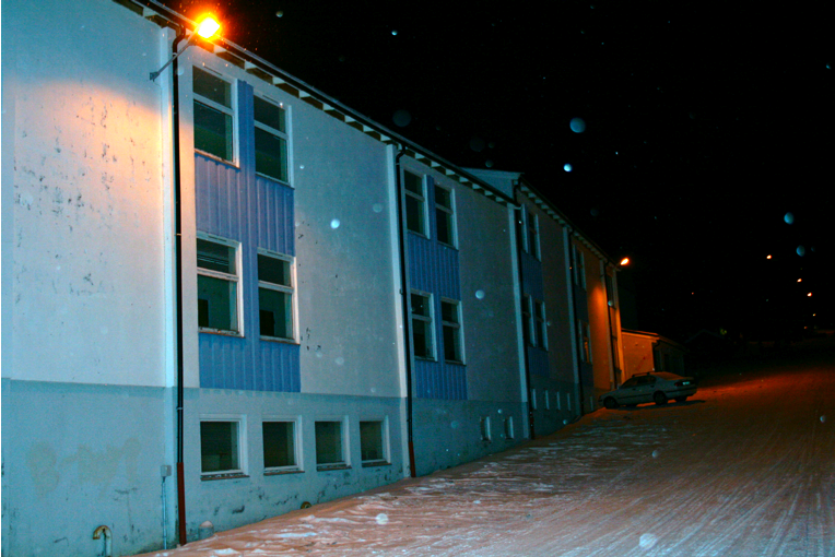 Seljestad ungdomsskole i Harstad, november 2008